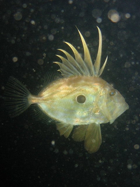 Muxumartin.